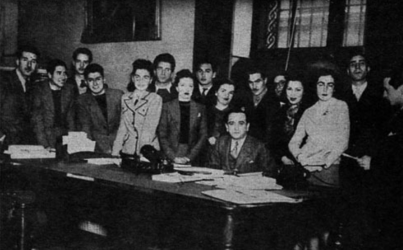 El grupo de Teatro Experimental junto al Rector de la Universidad de Chile, JUVENAL HERNANDEZ, cuya colaboración con los estudiantes ha quedado ampliamente demostrada en esta ocasión.